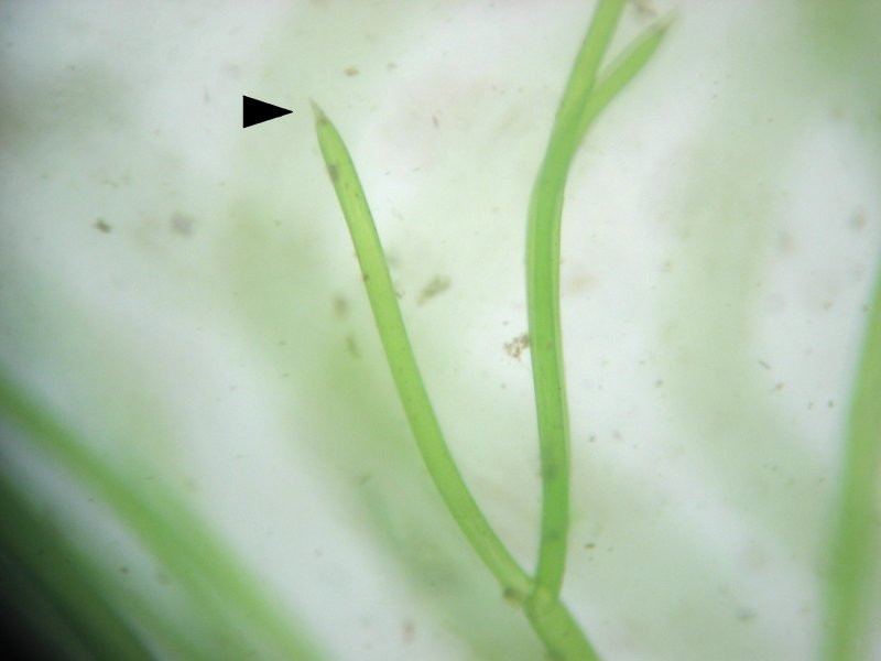 Stachelspitzige Glanzleuchteralge Nitella mucronata, Astspitze, Müritz-Gebiet